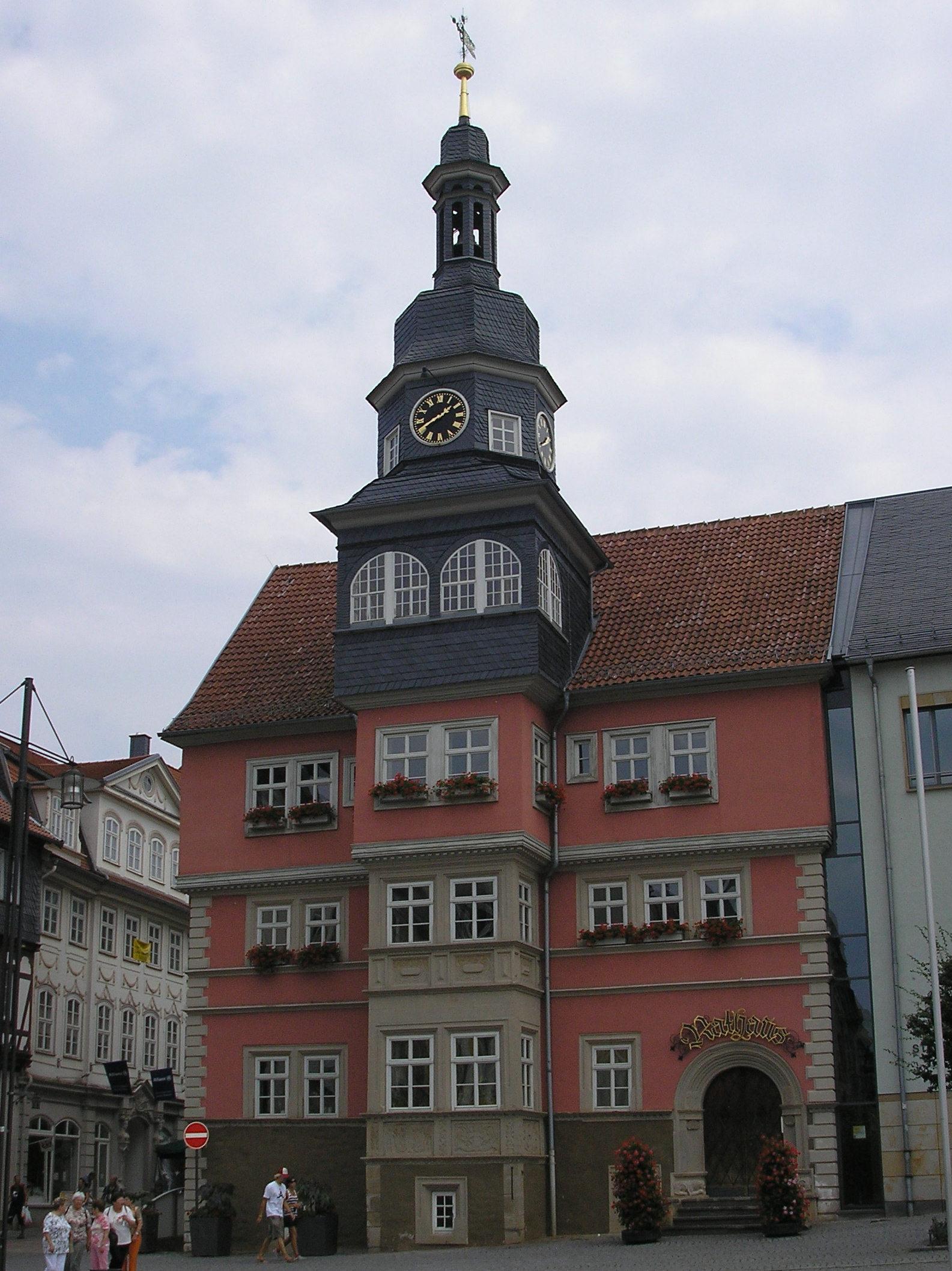 Rathaus von Eisenach (Thüringen)